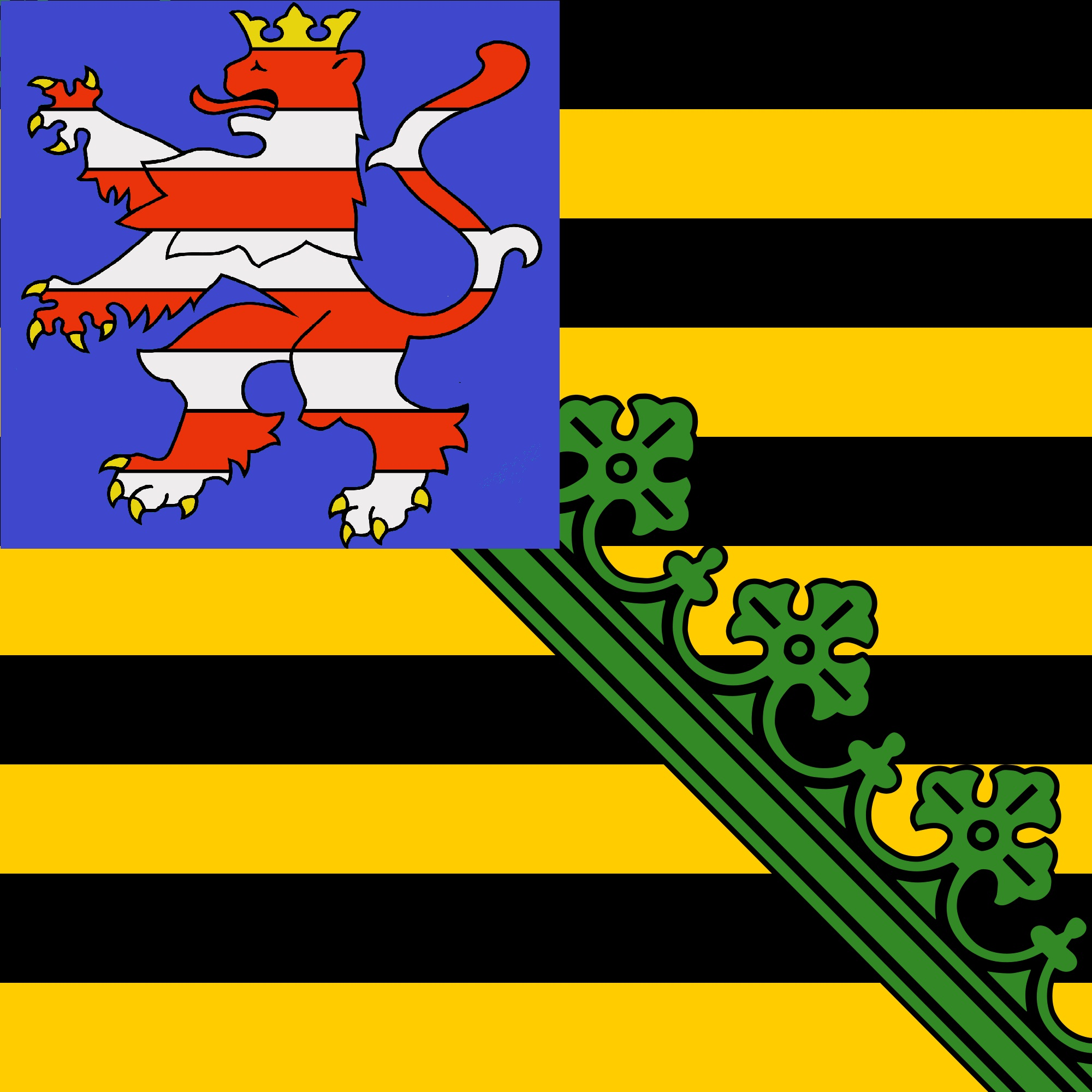 The standard of Sachsen Weimar/Sachsen-Weimar-Eisenach.